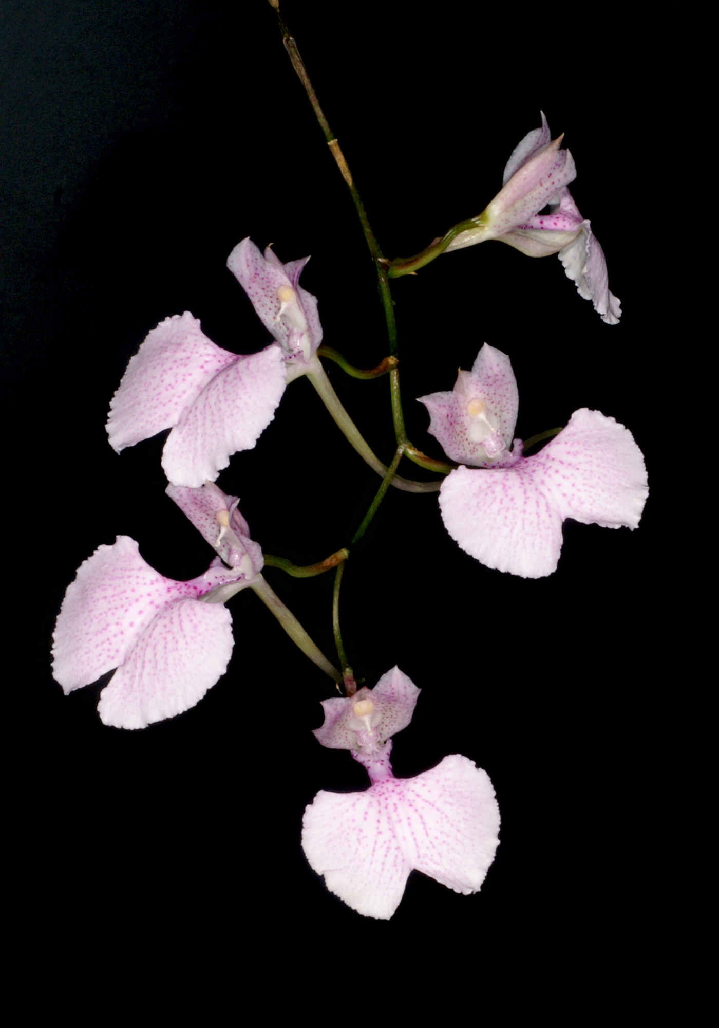 Comparettia macroplectron